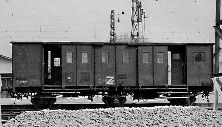 Ancien fourgon PLM à 3 essieux